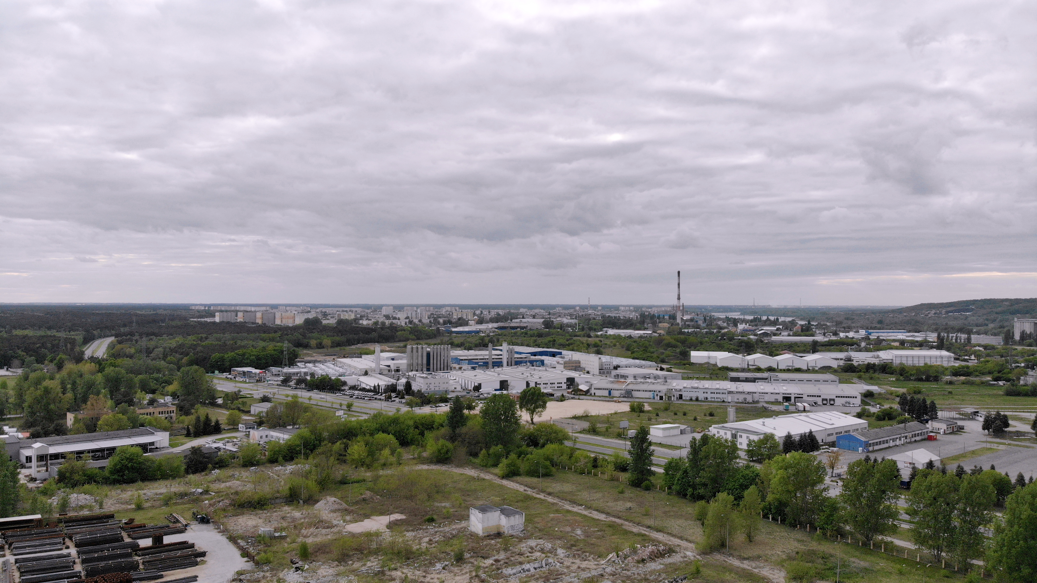 Kazimierza Wielkiego (2020 r.)